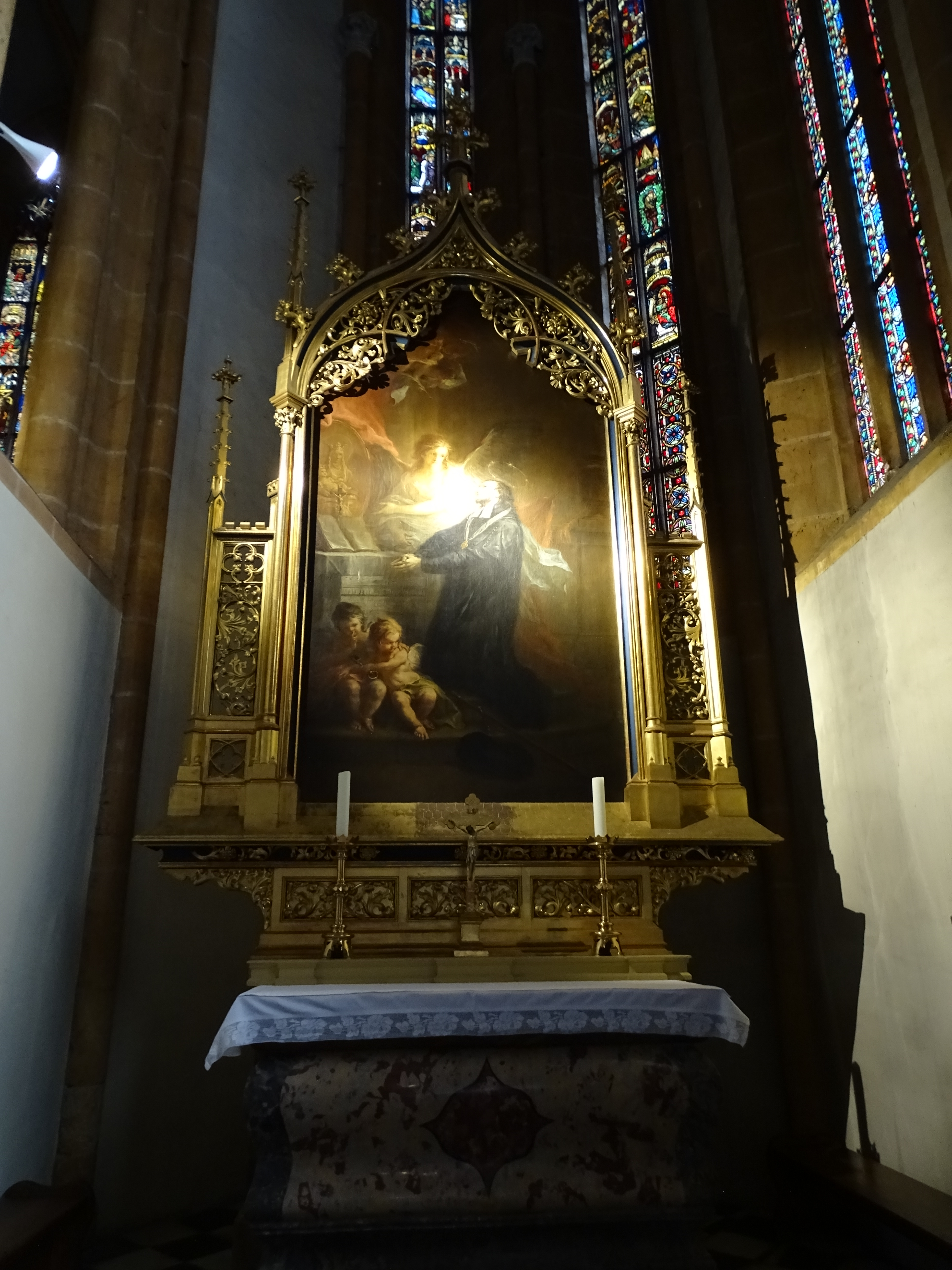 Der Johannes-Nepomuk-Altar in der Wallfahrtskirche Maria Straßengel